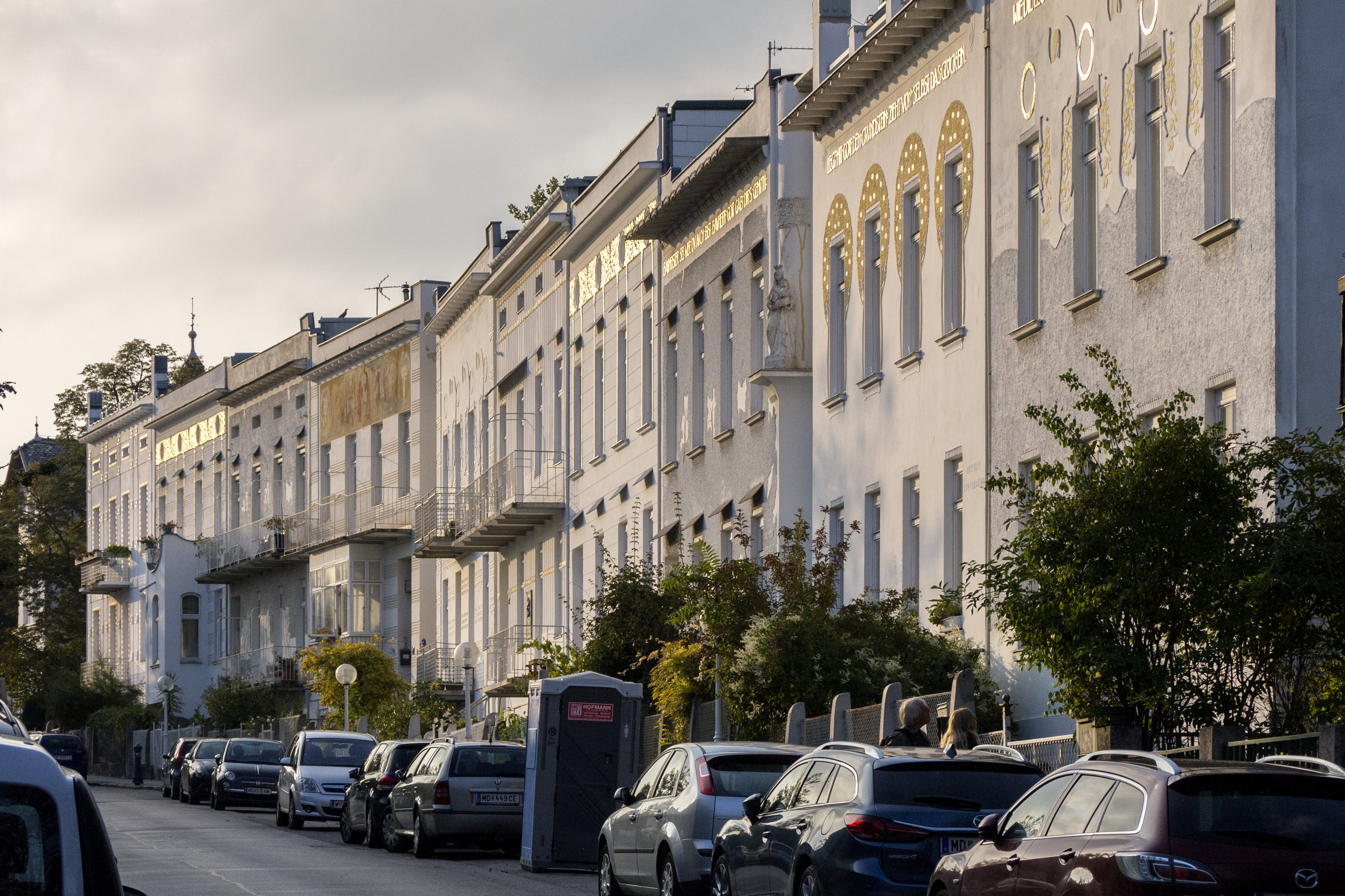 Brunn am Gebirge Jugendstilhäuser